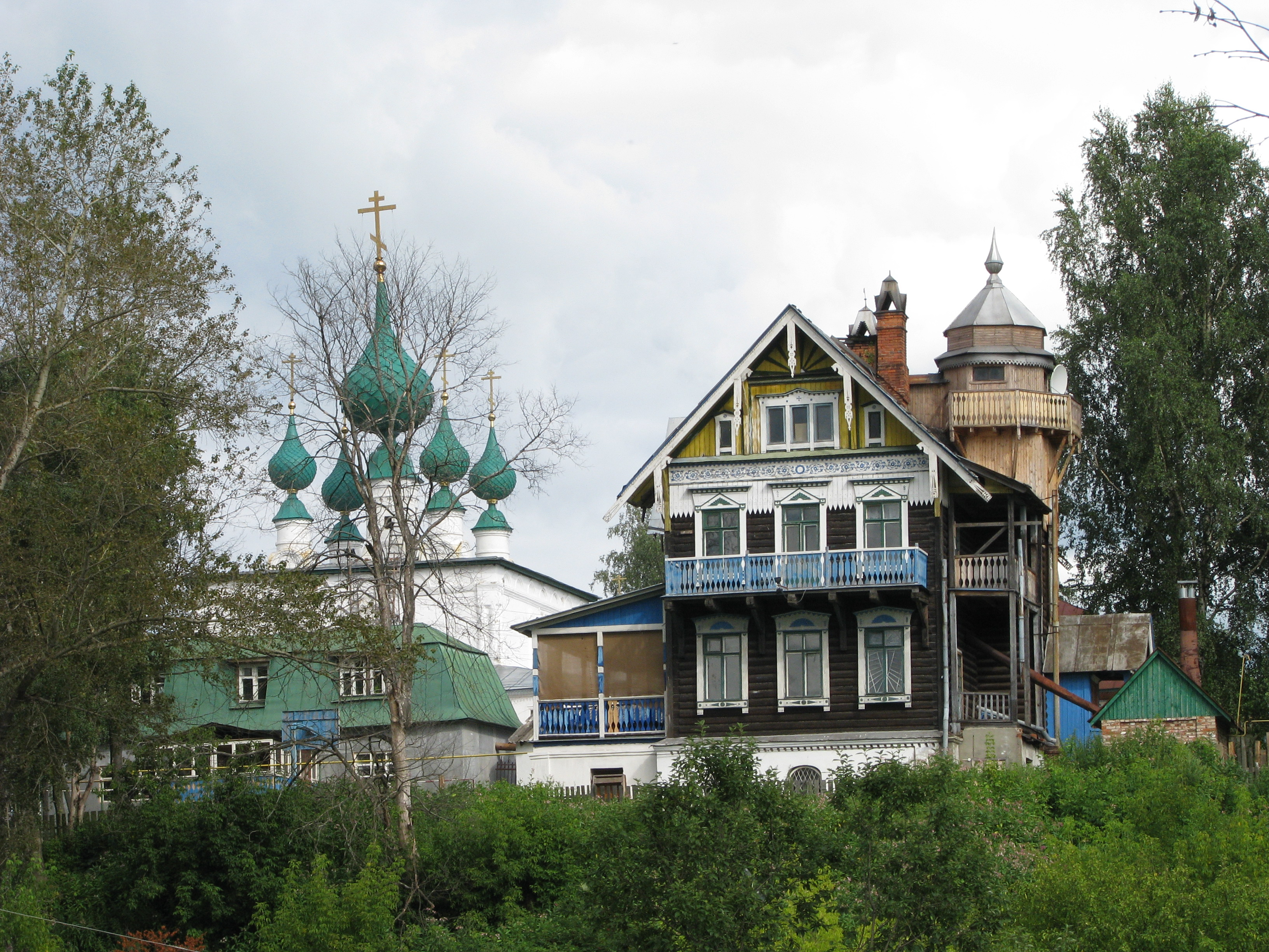 Дом Нагорских ("Теремок")